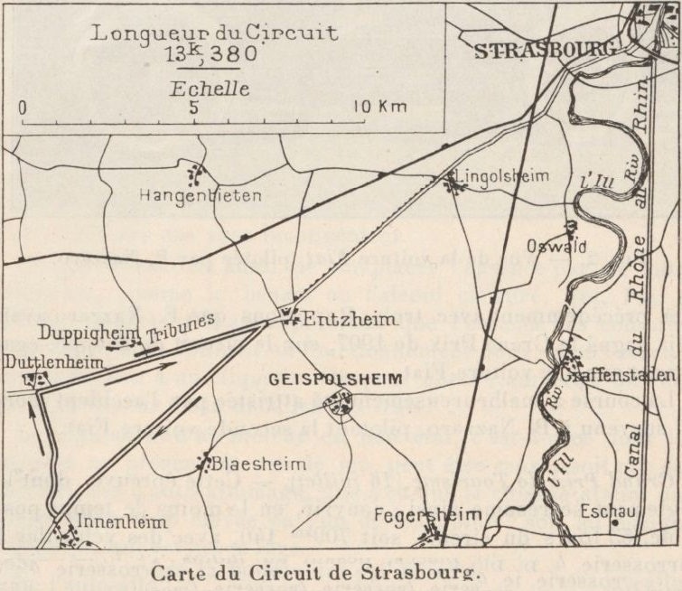 1922 French Grand Prix - Circuit de Strasbourg.